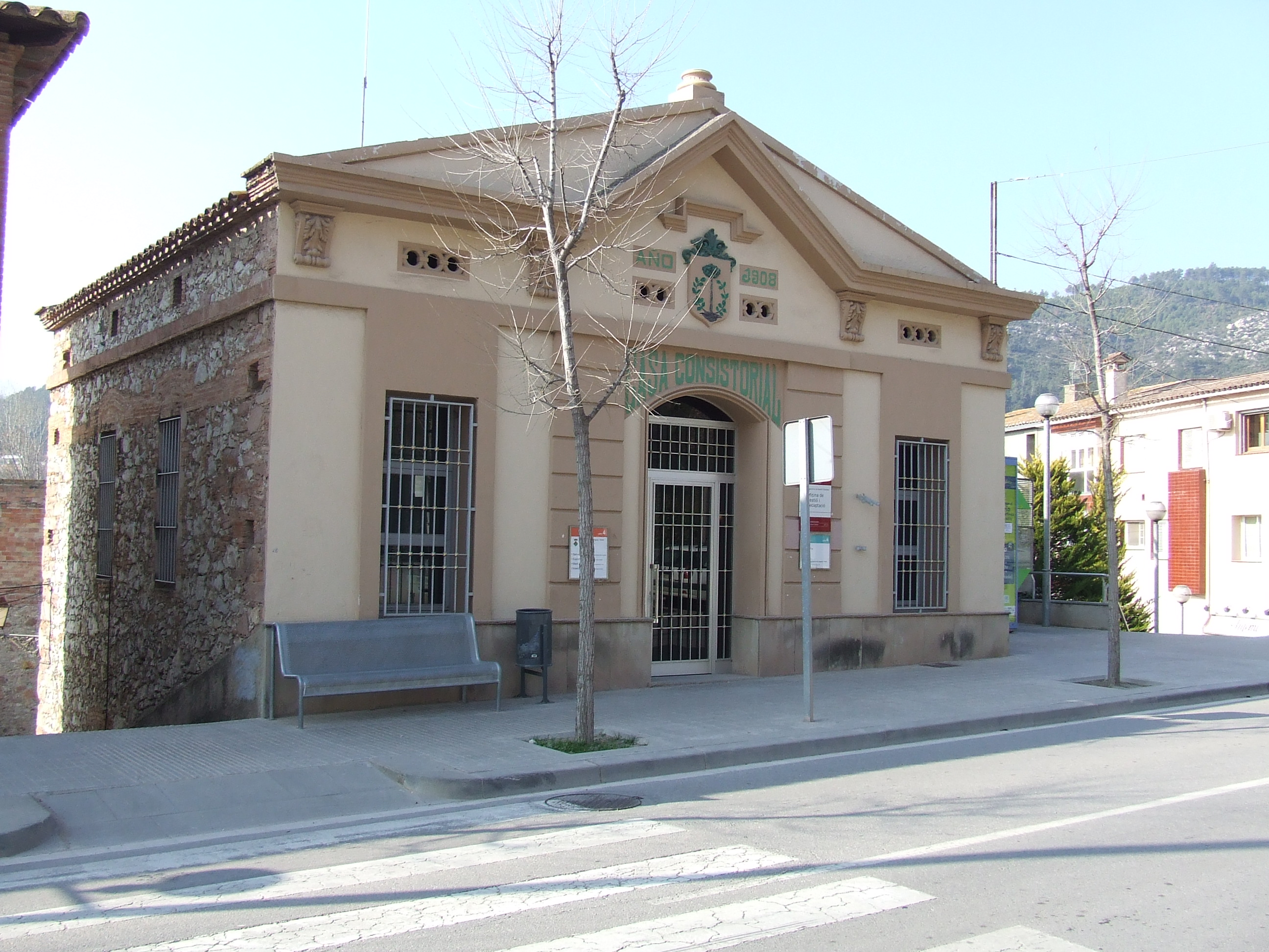 Casa de la Vila vella de Bigues i Riells (Vallès Oriental).